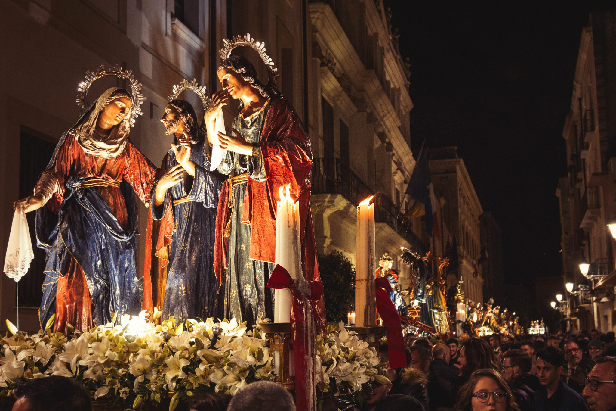 un silenzio assordande , le onde del mare in sottofondo , e scruscio di ciaccula.......... u ciaru di Cira...................... SI ! me ne sono Innamorato foto e testo a cura di Giuseppe Sanalittro